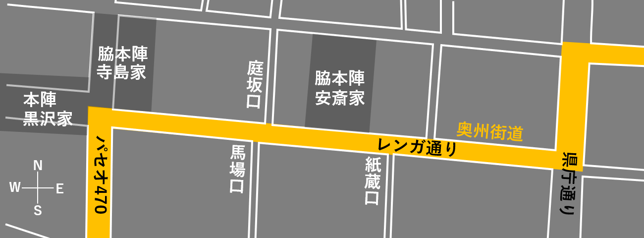 奥州街道は市道中町・御山町線を柳町から本町まで北上、右折してレンガ通りに入り、県庁通りを北上、東に折れてテルサ通り(市道栄町・舟場町線)を経て旧電車通り(豊田町・八島町線)を北東へ抜ける。江戸時代、本町に位置するレンガ通り西端は四つ角ではなく、曲がり角付近に福島三本陣の内の2つがあった。